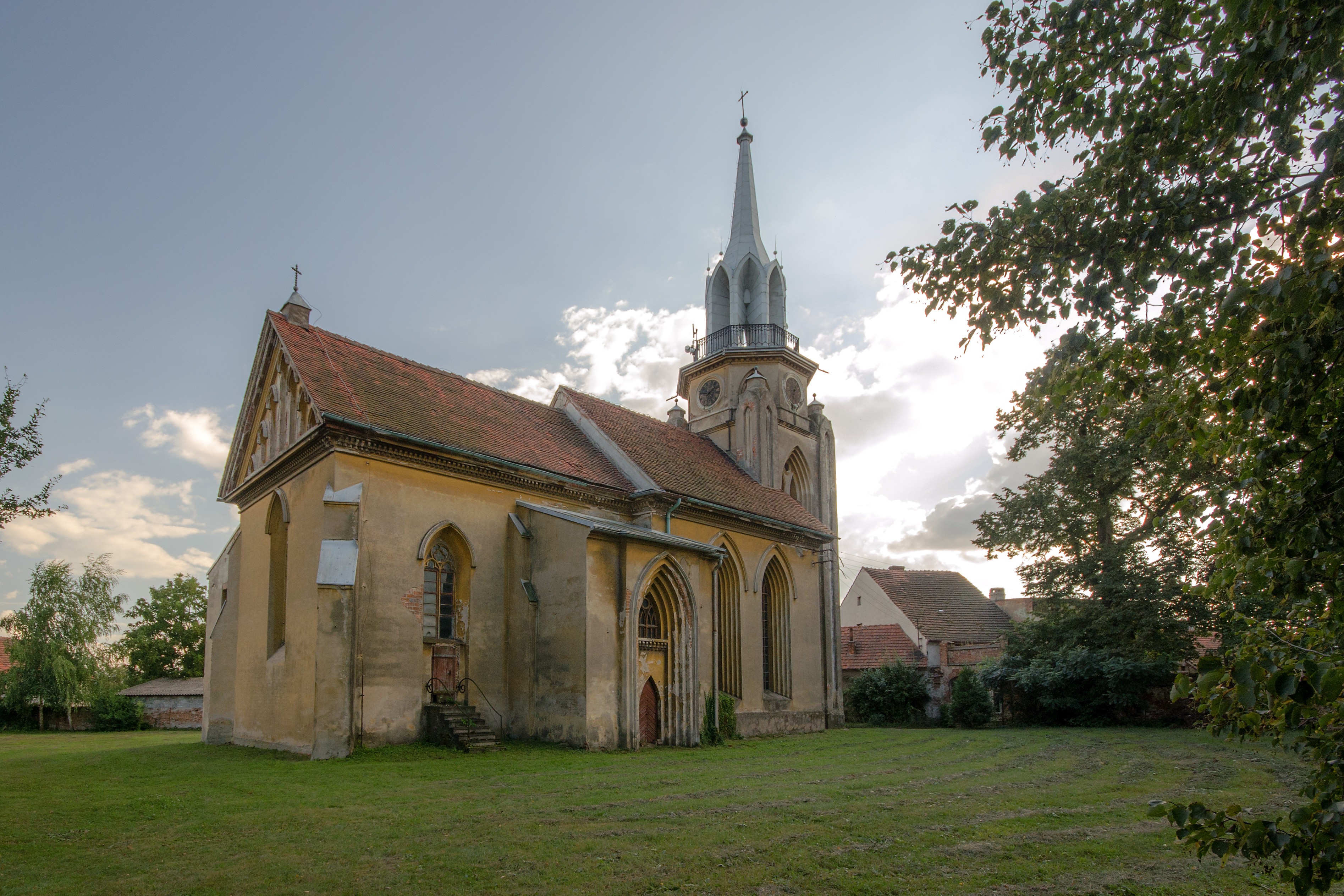 Michałów, kościół ewangelicki p.w. św. Michała, ob. rzym.-kat. pom. p.w. św. Józefa, 1826-1827